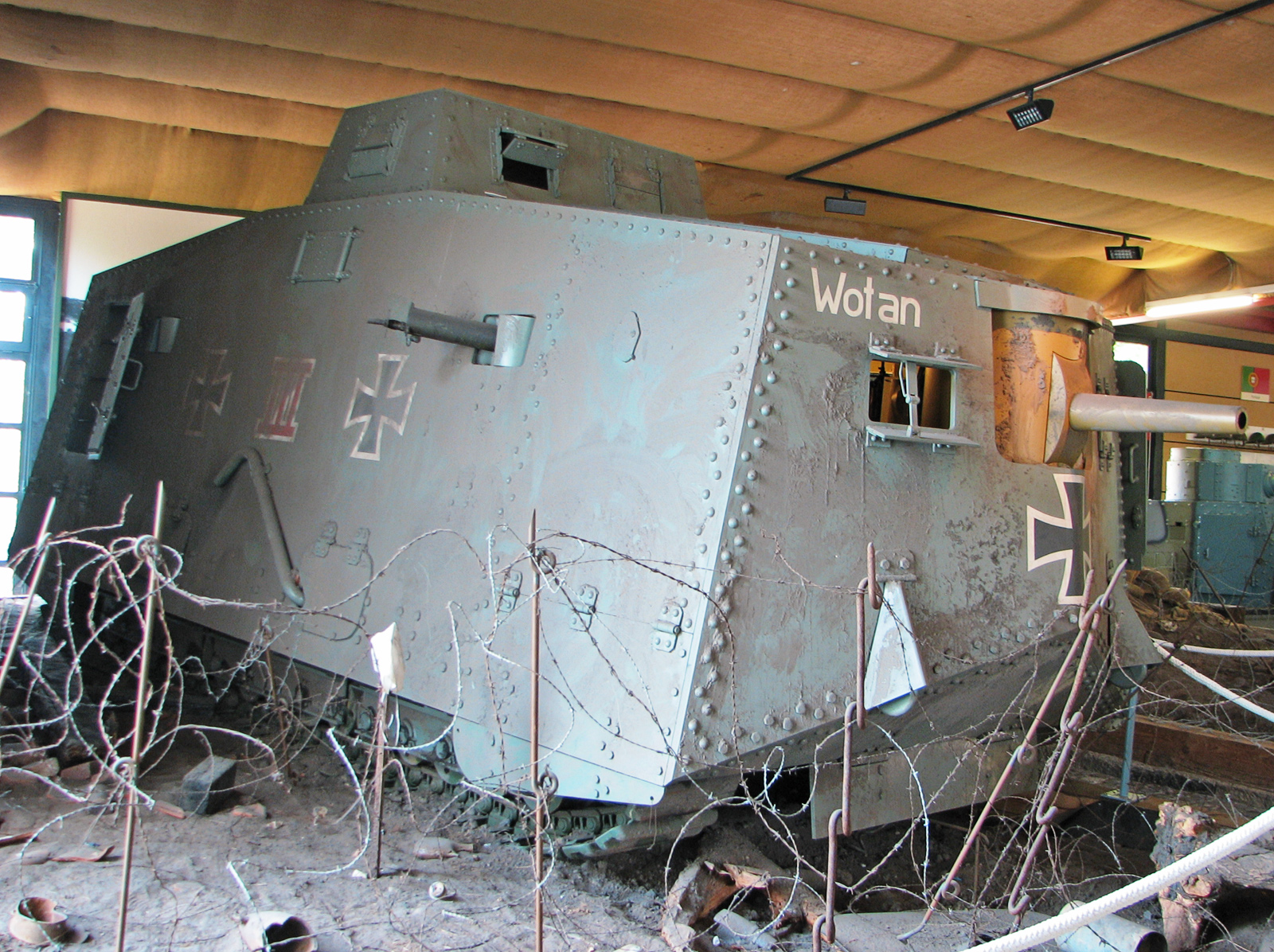 Dieses Bild zeigt den Nachbau des A7V "Wotan".